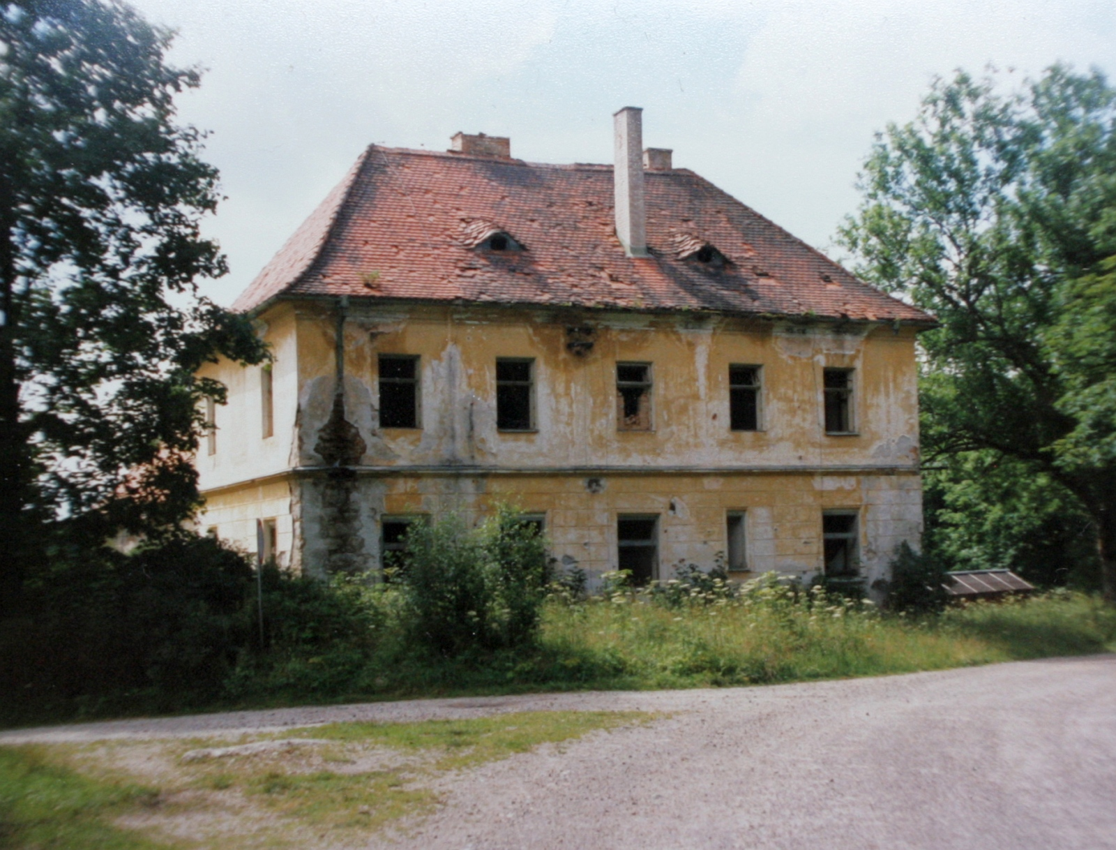 Pohoří na Šumavě - fara, stav v roce 1997. Sken fotografie.